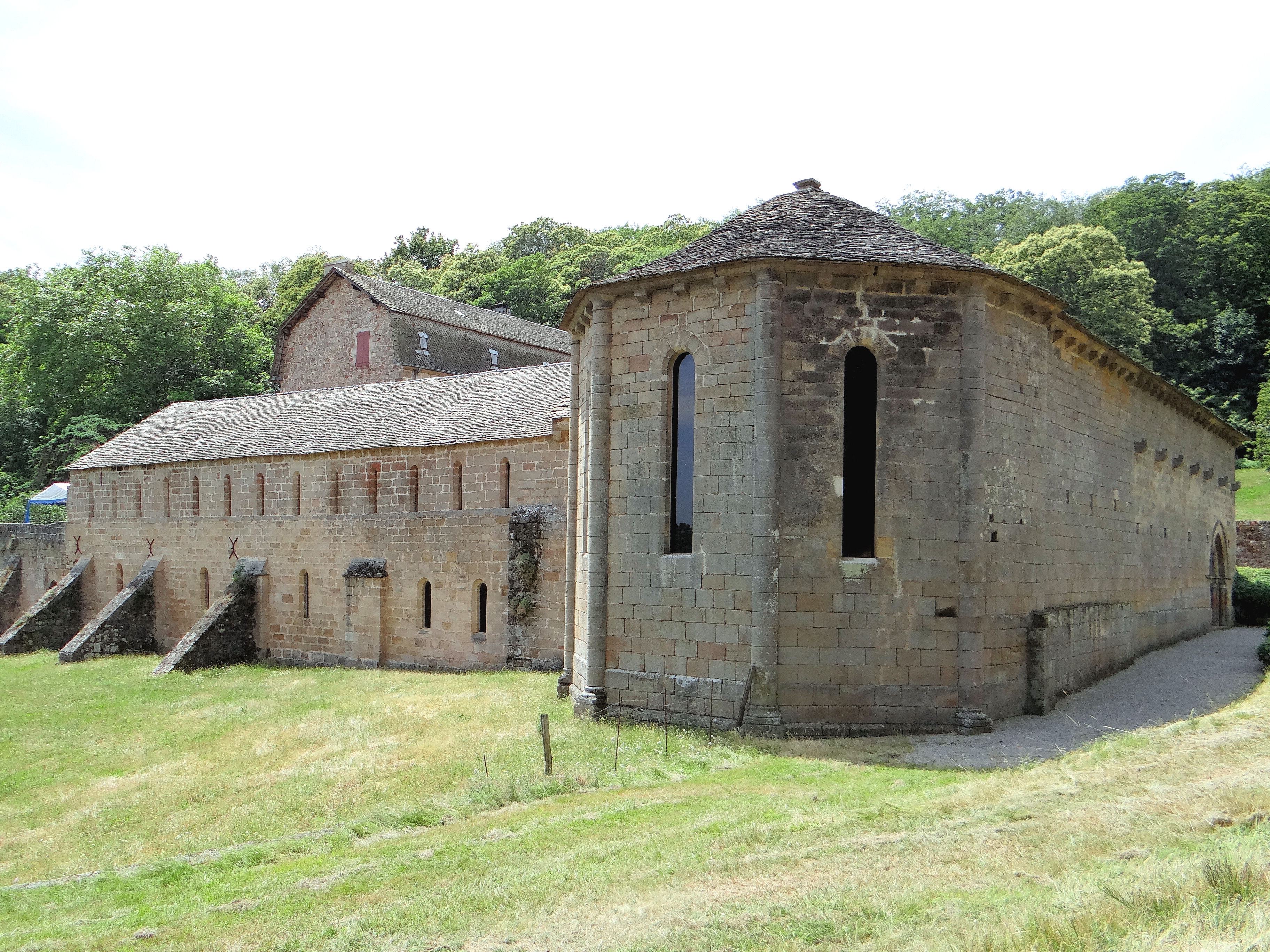 Saint-Beauzély - Prieuré de Comberoumal - L'église et le bâtiment du prieuré .